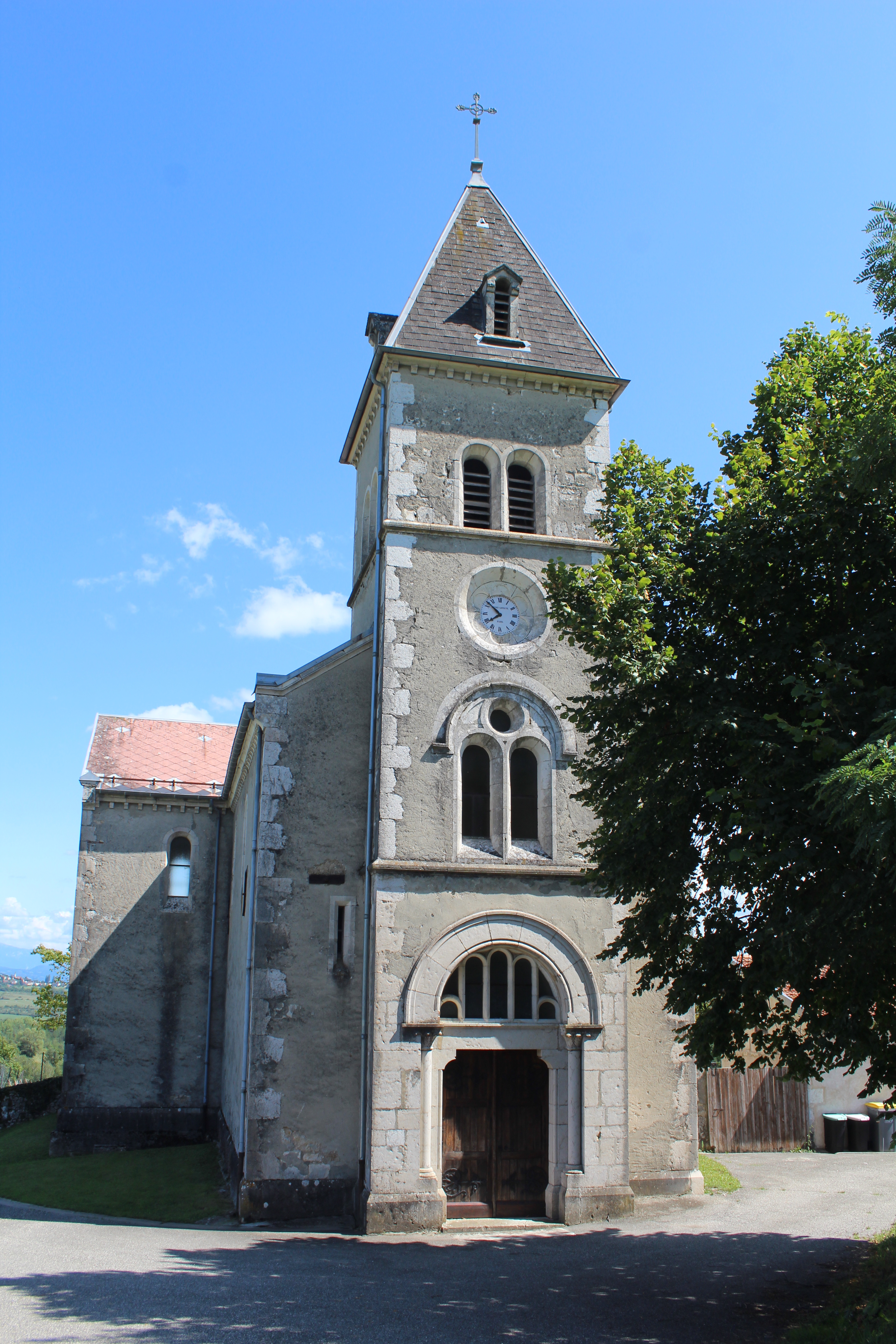 Église Saint-Jean-Baptiste de Lhôpital.